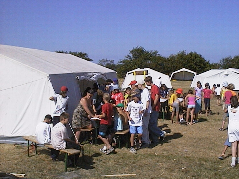 Zeltlager der Dortmunder Falken 2003 in Nieblum auf Föhr